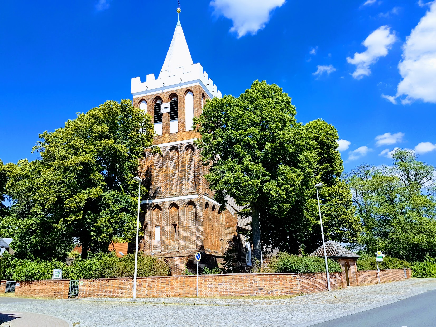 Dorfkirche Werben